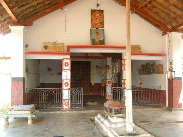 Template:காமன்சுக்கு நகர்த்துக சுருக்கம் உபயகதிர்காமம் ஸ்ரீ சக்கர சண்முகர் ஆலயம், தற்போதைய முகப்புத் தோற்றம்